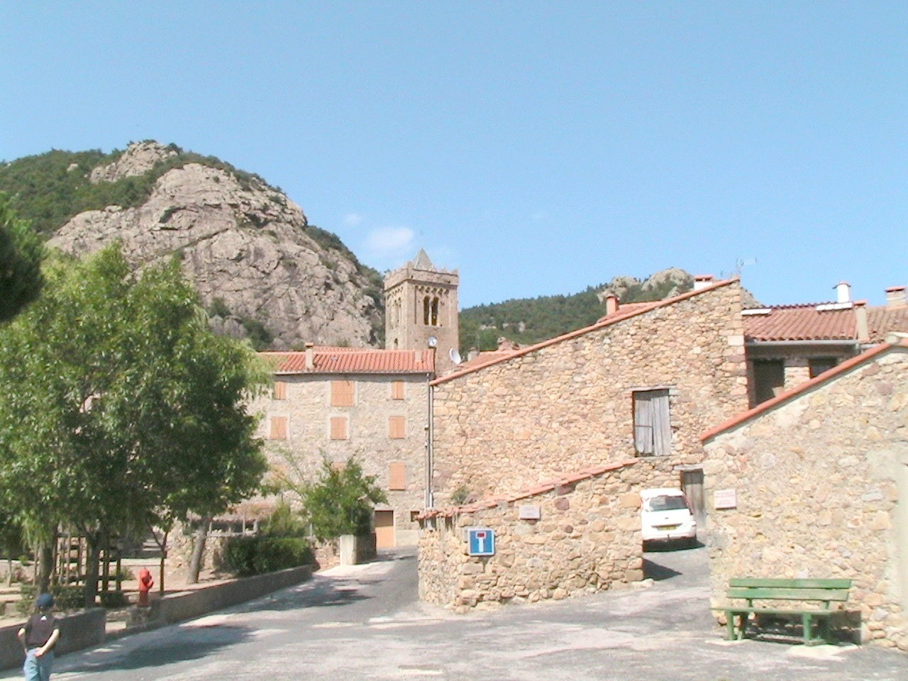 Vue de l'église Notre-Dame de l’Aubépine, de Coustouges (Pyrénées-Orientales, France) depuis la place du village.